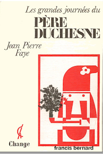 Père Duchesne